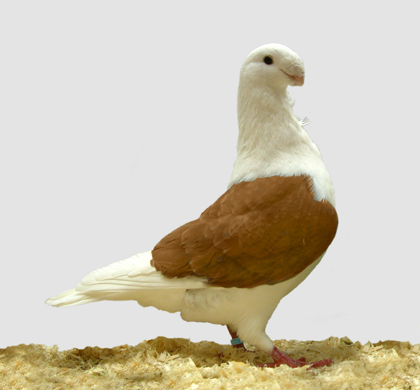 Antwerp Smerle pigeon